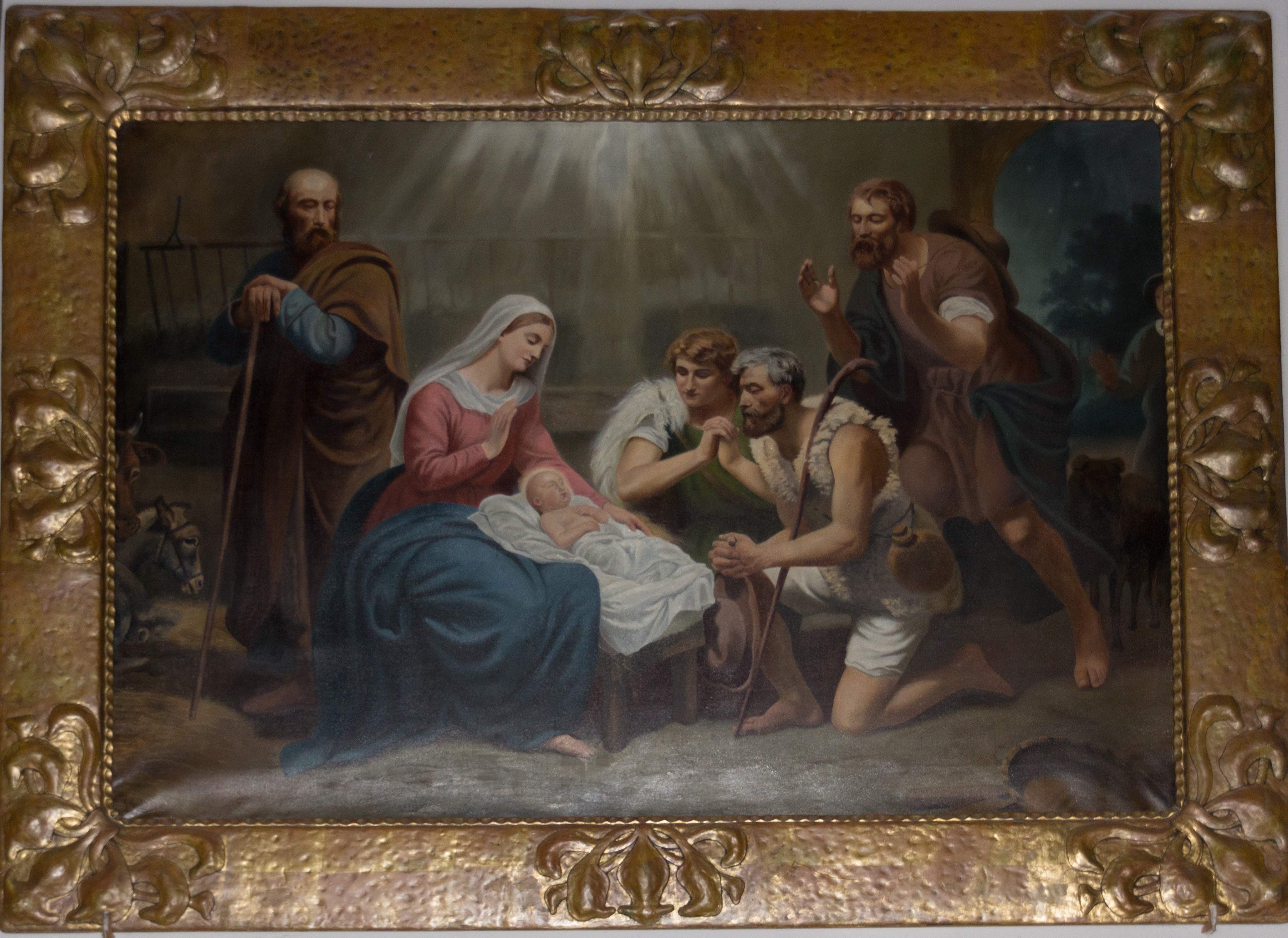 Dorfkirche Hohen Neuendorf Ölgemälde